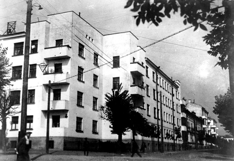 Беларуская (тарашкевіца): Віцебск (Viciebsk), вуліца Ўзгорская (vulica Ŭzhorskaja)